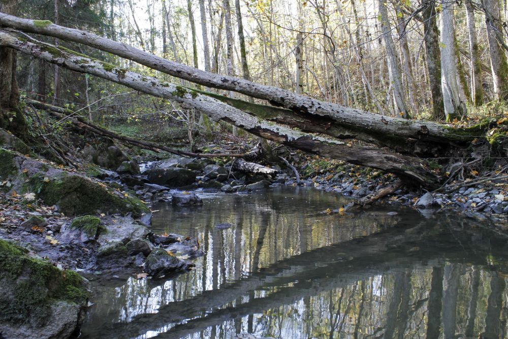 Tangenbekken har gitt navn til reservatet.